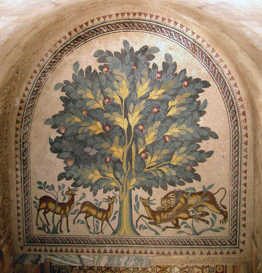 Jericho (more details in the photo's title) יריחו (מידע נוסף בשם הקובץ)